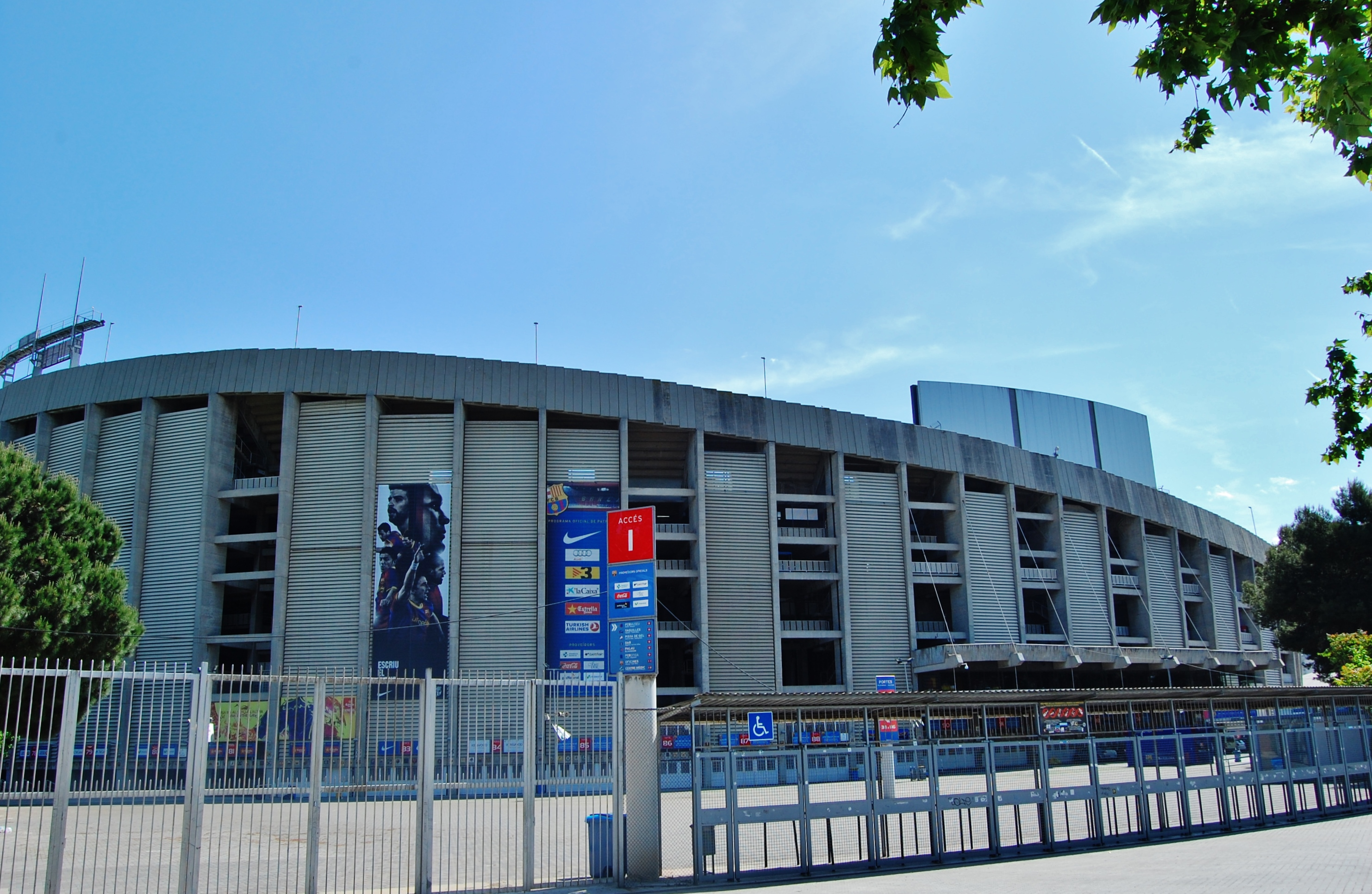 Camp Nou (Barcelona)